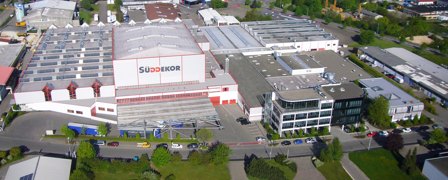 Luftaufnahme des Unternehmens Süddekor GmbH